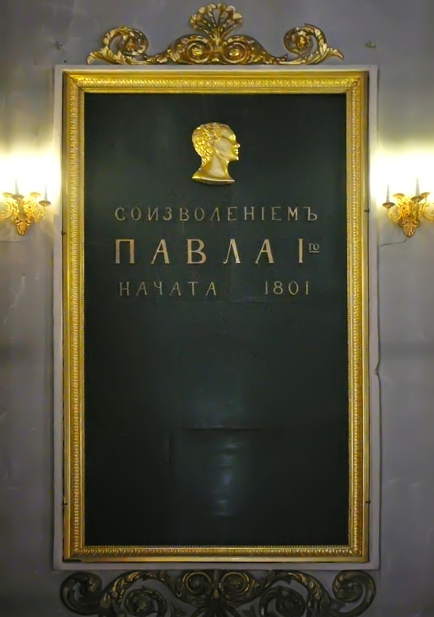 Памятная доска в Соборе Казанской иконы Божией Матери с надписью «Соизволенiемъ ПАВЛА I-го начата 1801»